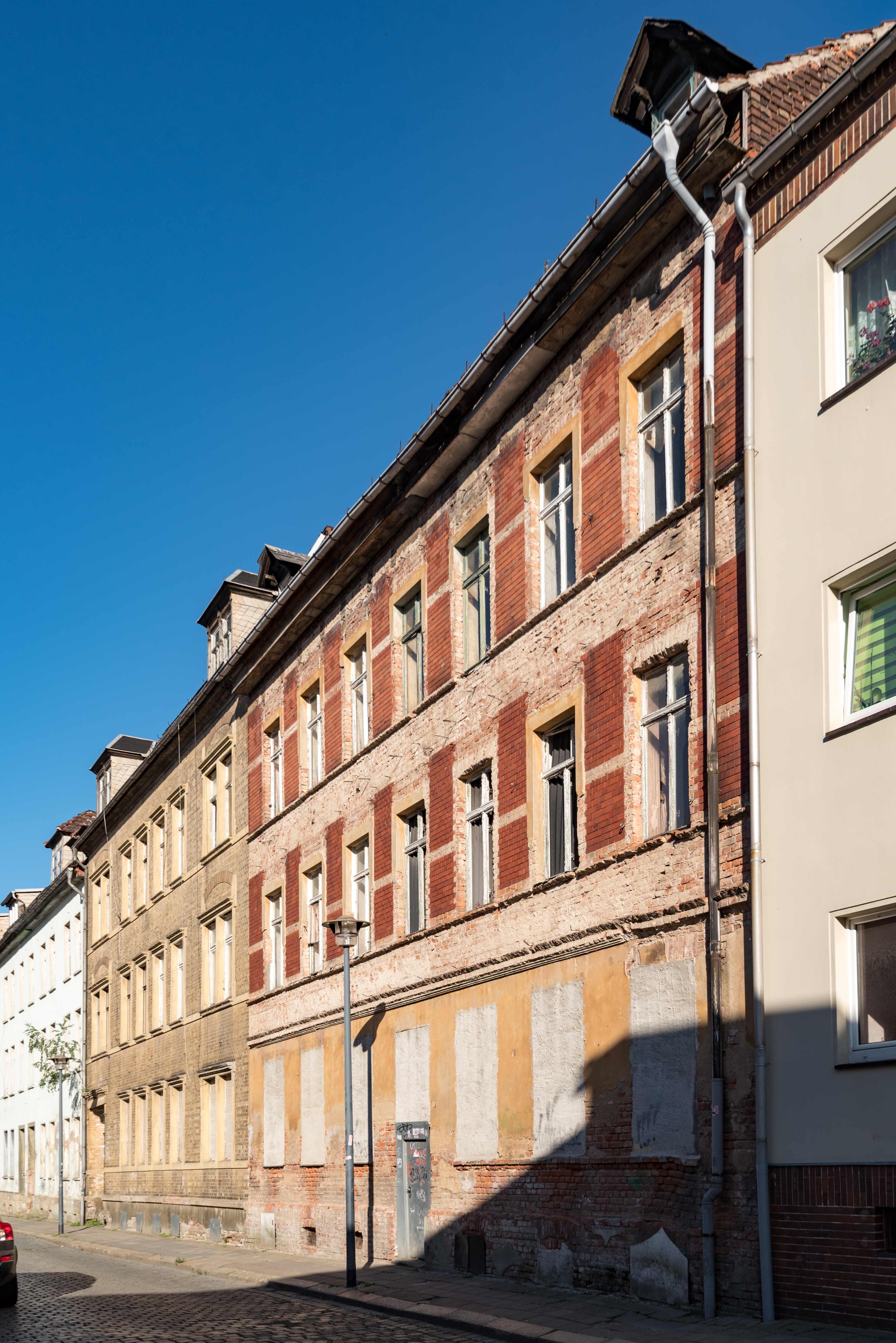 Weißenfels, Rudolf-Götze-Straße 14